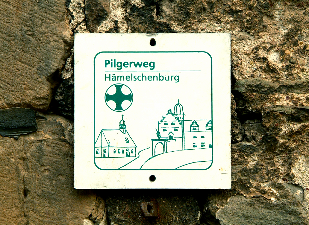 Auswahl von Ansichten aus Emmerthal-Hämelschenburg, die Ortschaft rund um Schloss Hämelschenburg mit ihren jahrhundertealten Geschichten bis in die Gegenwart.